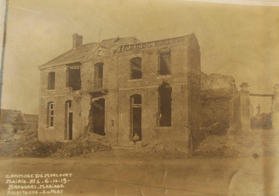 Photo de la mairie en 1919